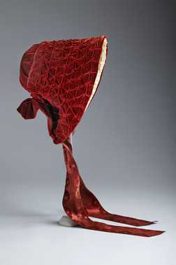 Luifelhoed, bordeauxrood fluweel, keelbanden van bordeauxrood zijden satijn met plaatselijk ingeweven pool